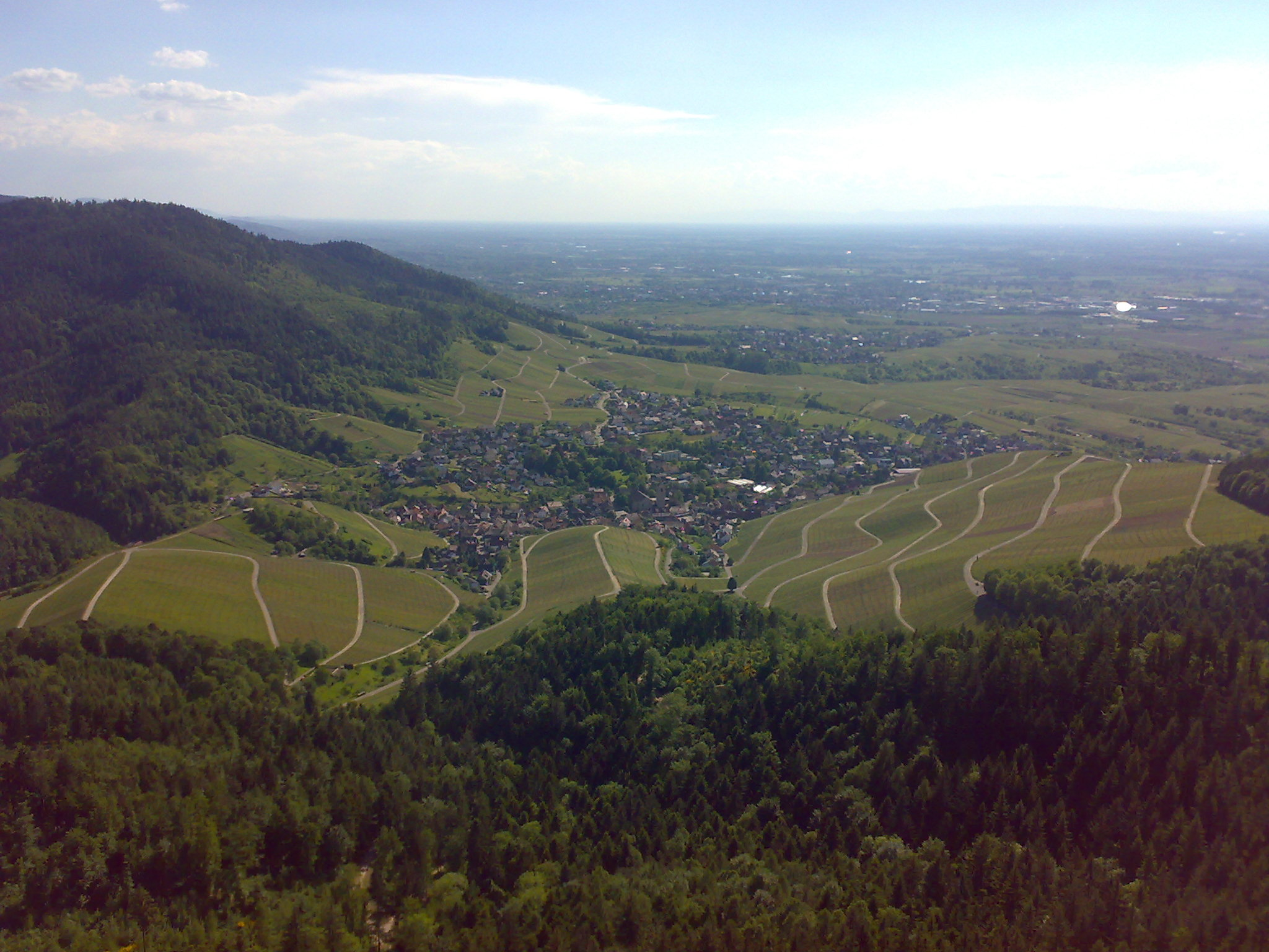 Blick von der Yburg auf Neuweier und die Rheinebene